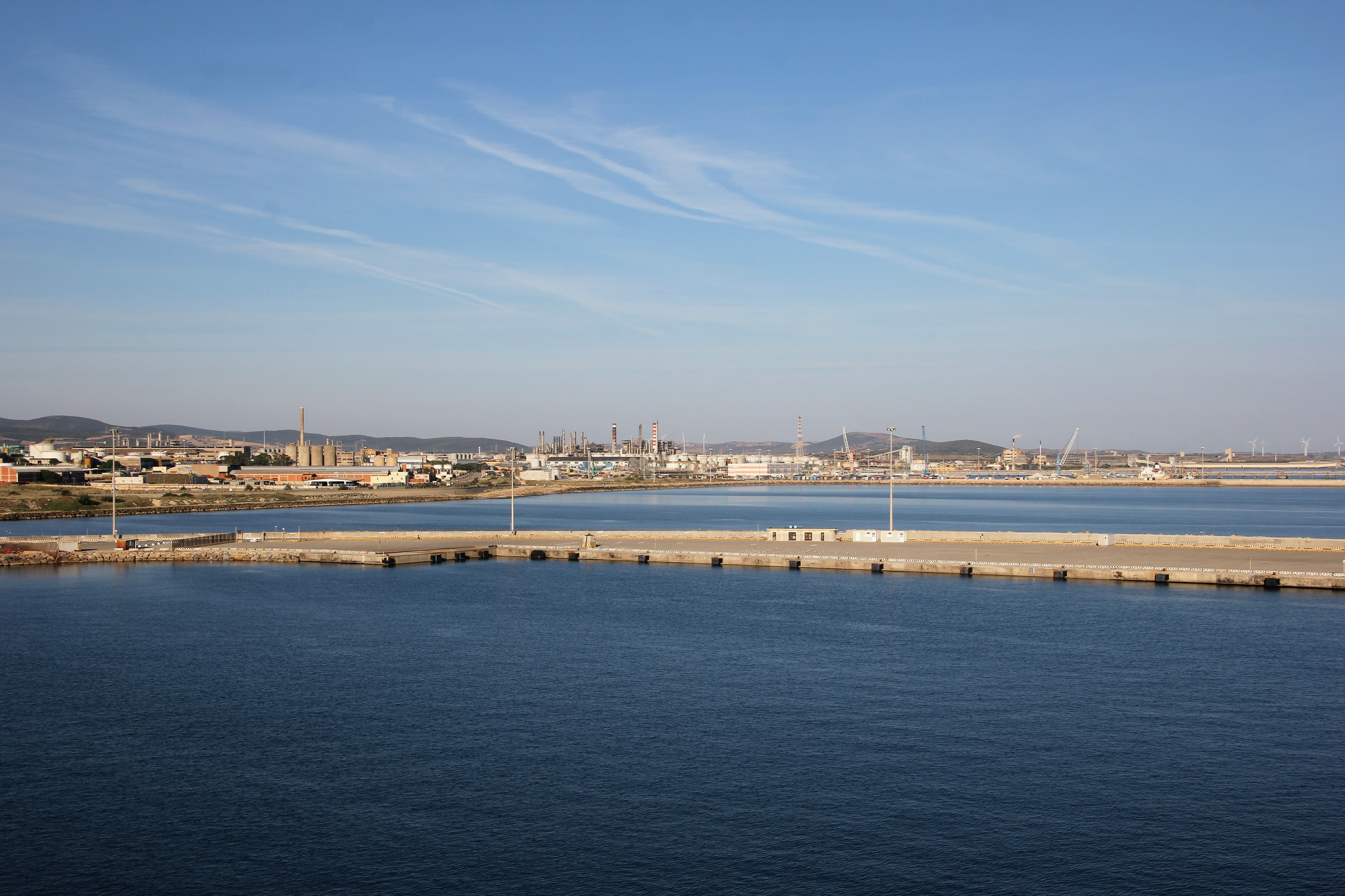 Porto Torres, zona industriale